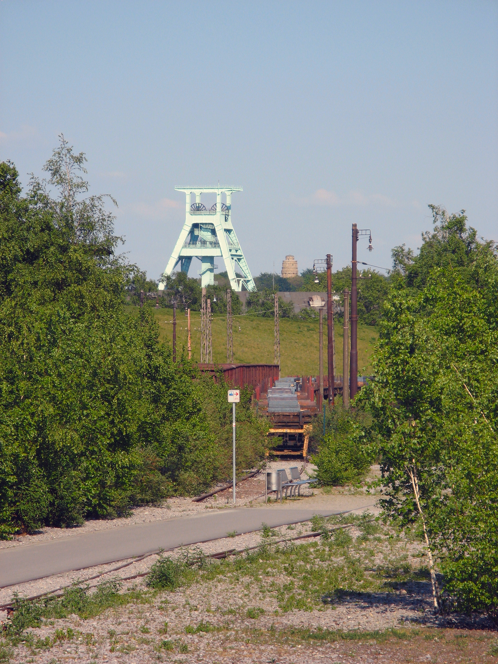 Bochum Westpark. Blick auf ein Jahrhundert Stadtgeschichte. Laternen im Industriedesign, Gleise und Eisenbahn sind dekoratives Überbleibsel aus einer Zeit als der 'Bochumer Verein' noch Stahl produzierte. Bergbau findet im Bochum nur noch im Museum statt, das aber weithin sichtbar. Der Förderturm ist das Wahrzeichen des 'Deutschen Bergbaumuseums'. "Flammen über ganz Deutschland zu Ehren Bismarcks leuchten lassen" - dazu hatten die deutschen Studenten 1898 aufgerufen. Überall im Lande sollten Säulen und Türme mit bekrönenden Flammenschalen zu Ehren des Verstorbenen errichtet werden. Der Bismarck-Turm im Hintergrund wurde 1910 eröffnet. A view onto a century of town history. Industry design lanterns, railway tracks and equipment are a decorative relict of times when the steel mill 'Bochumer Verein' was still active. There is no mining in Bochum any more except in museum. The pithead-tower is the emblem of the German Mining Museum, one of the most significant ones worldwide. "To let flames shine all over Germany in honour of Cancellor Bismarck" - the german students had demanded 1898. All over the country there should be built columns and towers with flames on the top to remind in the deceased statesman. The Bismarck-Tower in background was opened 1910.